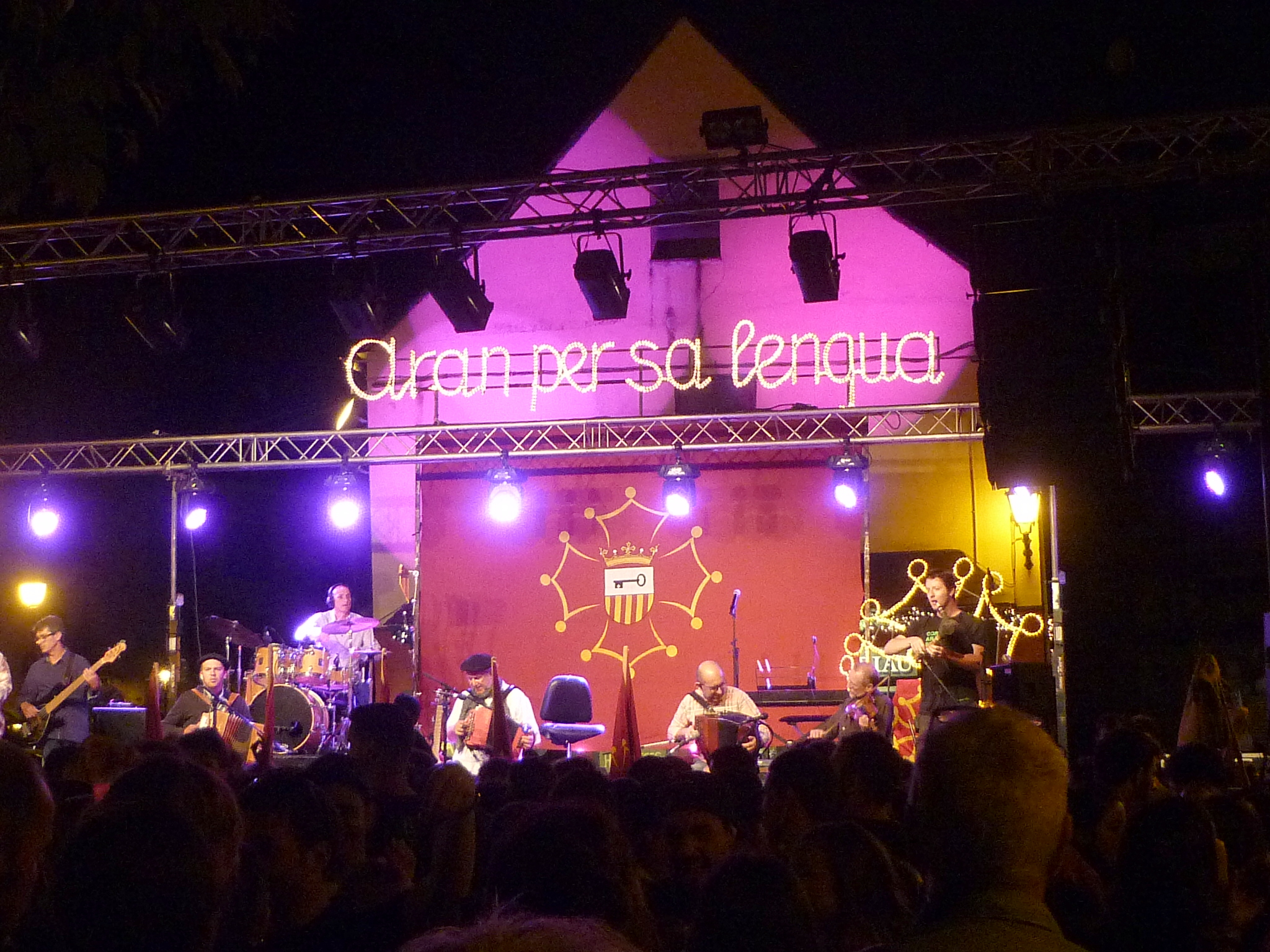 Actuació del grup Nadau, a la plaça de l'església, com a cloenda de la XXII-ena Corsa Aran per sa lengua.